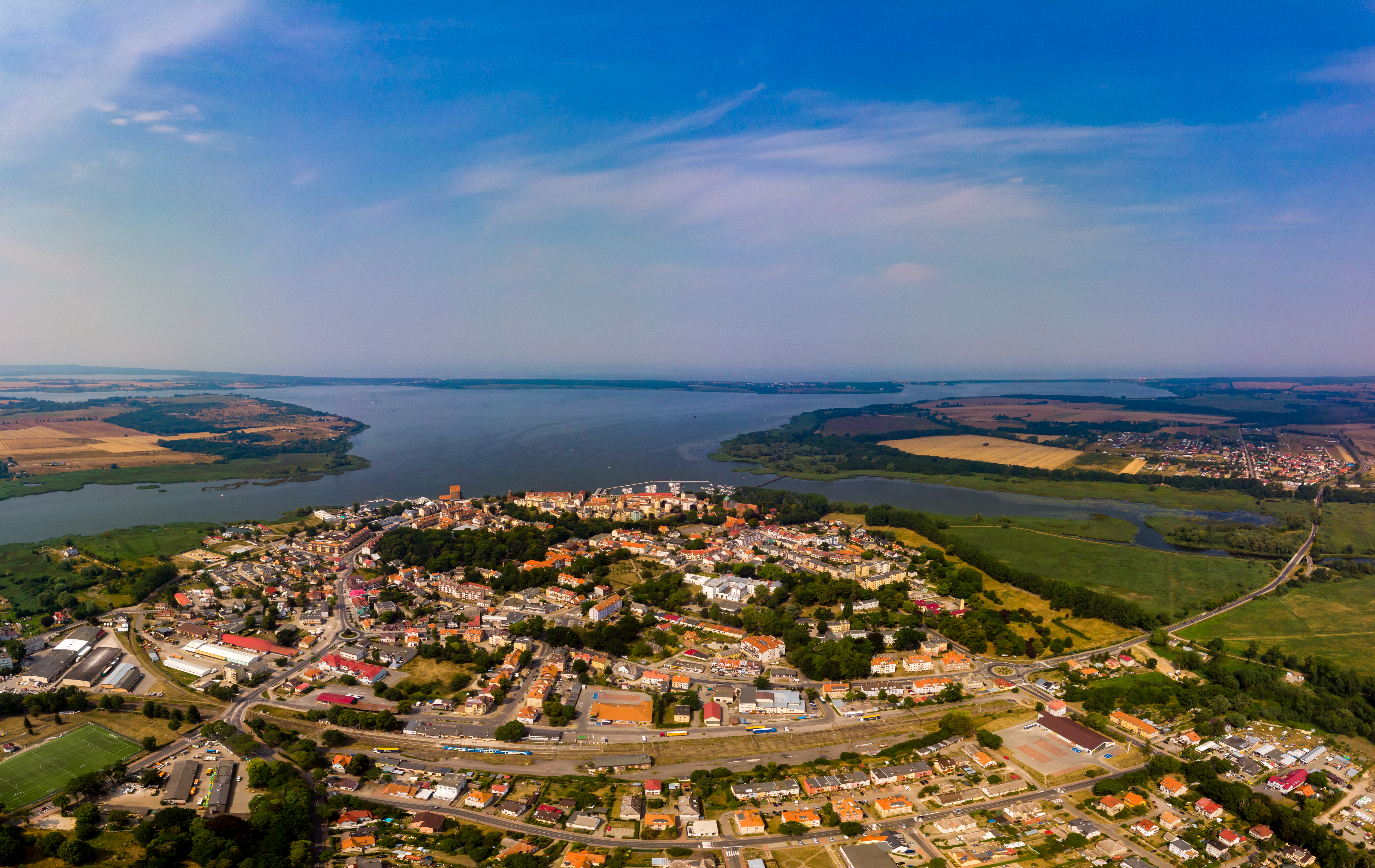 Kamien Pomorskie